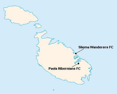 Répartition des clubs en First Division Maltaise 1933-1934.